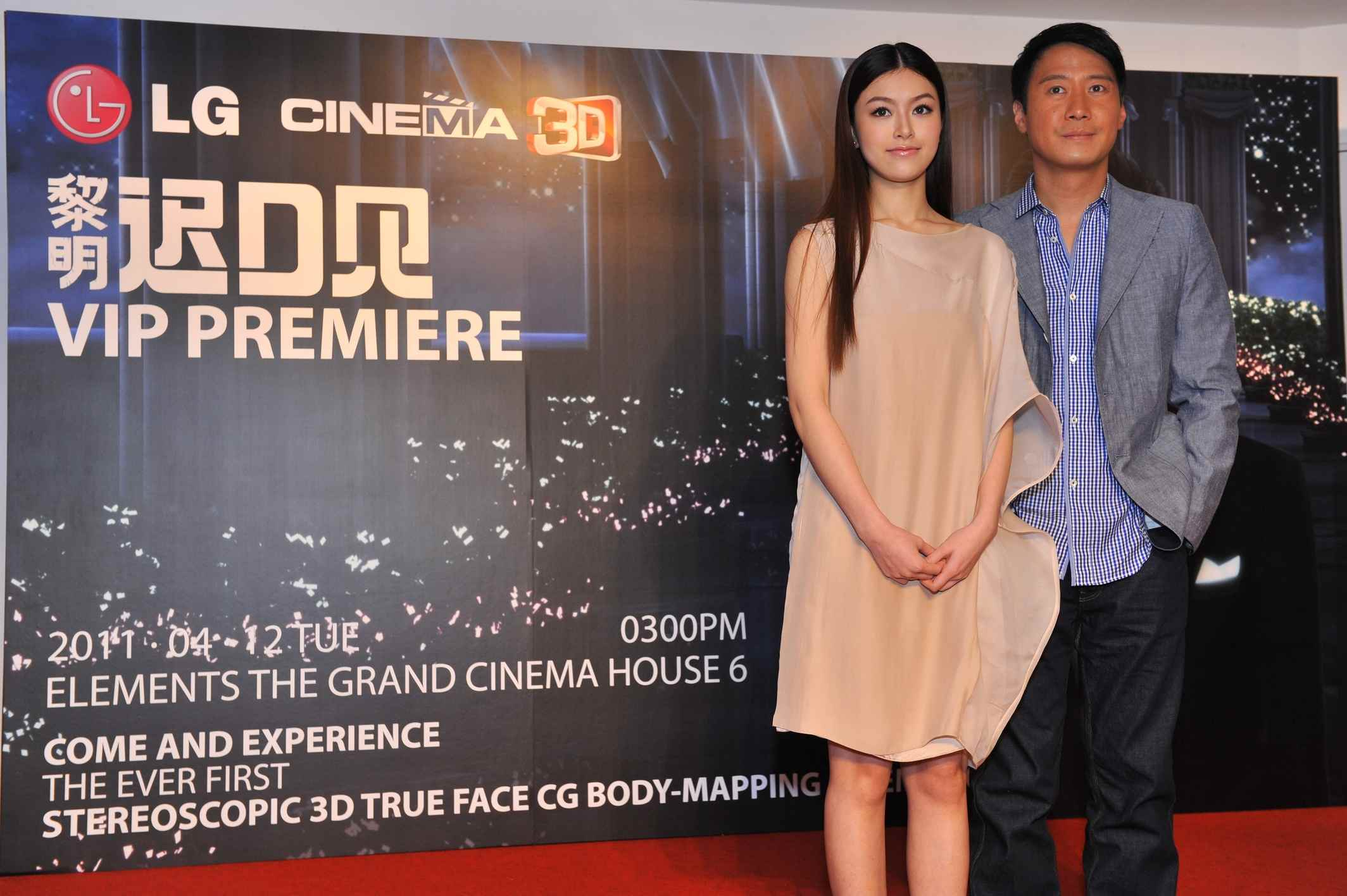 지난 12일 홍콩 그랜드 시네마 극장서 열린 LG전자의 여명 3D 뮤직비디오 VIP 시사회 무대에 선 홍콩 인기 스타 여명(우)와 홍콩 인기 모델겸 배우 제니스 만(좌)